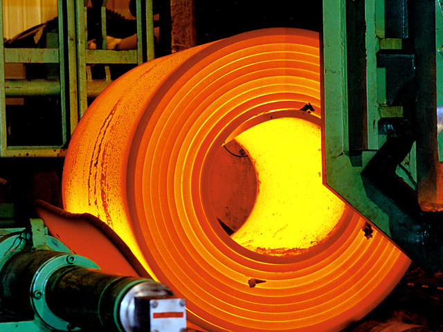 ArcellorMittal Tubarão